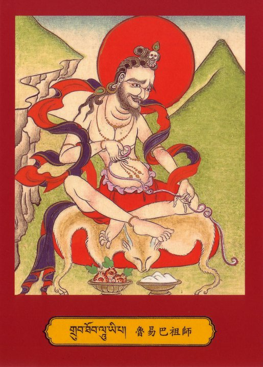 Mahasiddha Luipa, Indian Mahasiddha